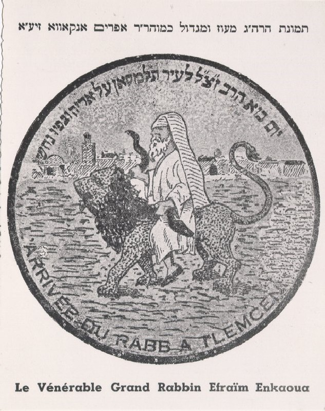 מדליון העיר תלמסאן: רבי אפריים נכנס לעיר